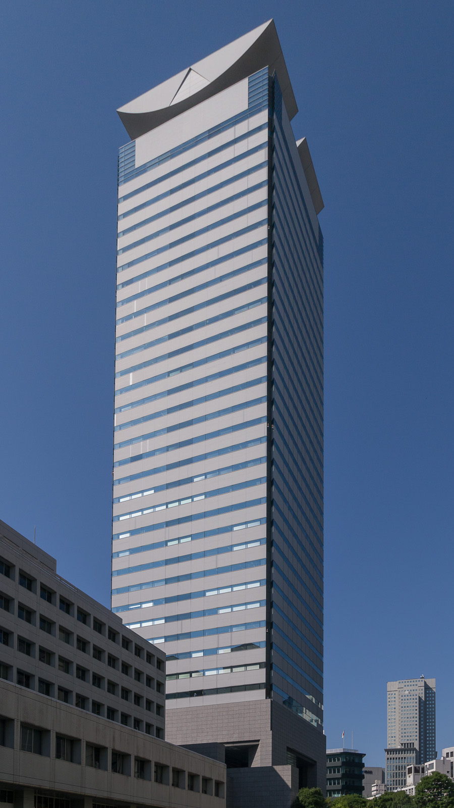 JTビル（日本たばこ産業本社ビル）、東京都港区虎ノ門2-2-1。